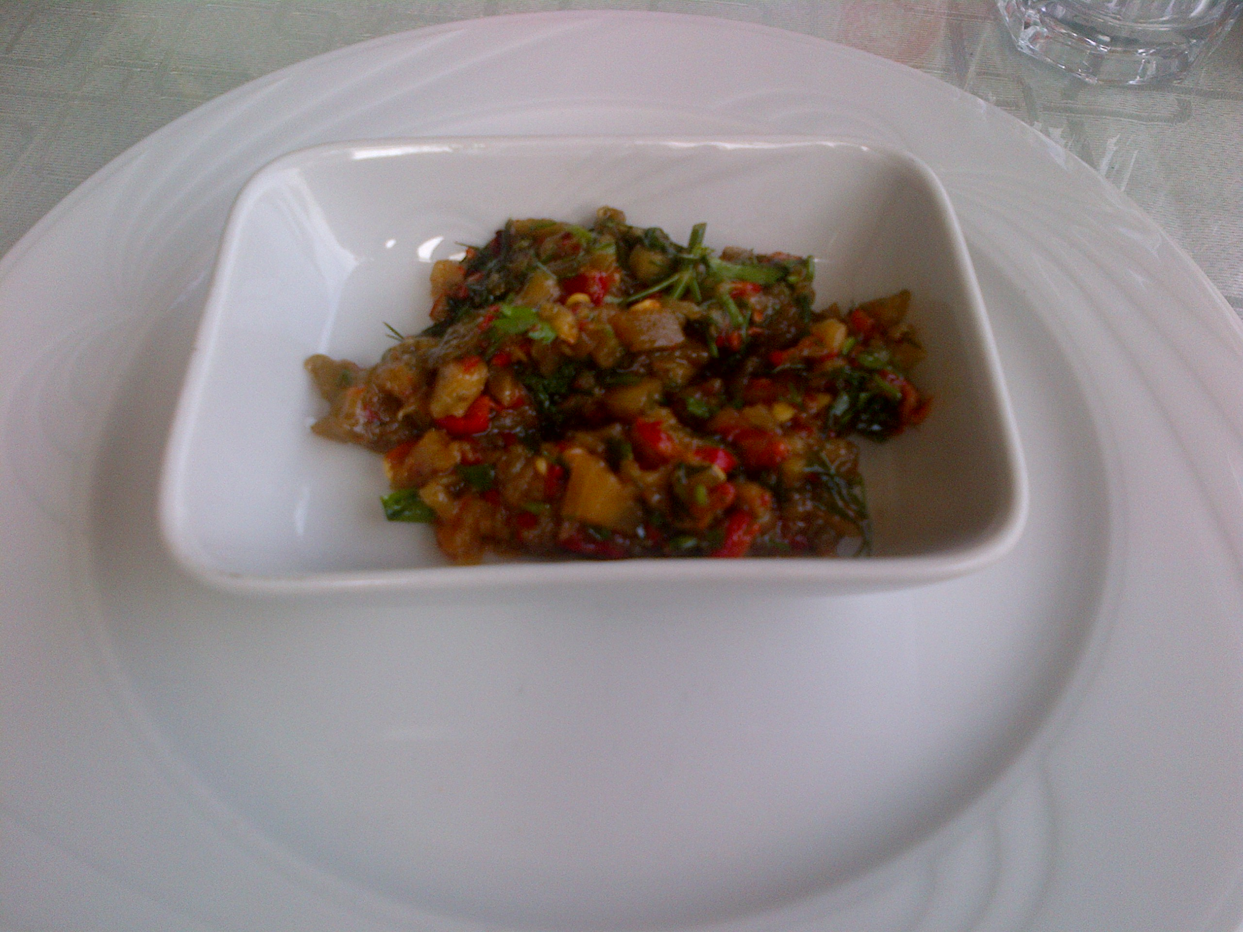 Ensalada de berenjenas, o "patlıcan salata(sı)" de la cocina turca.